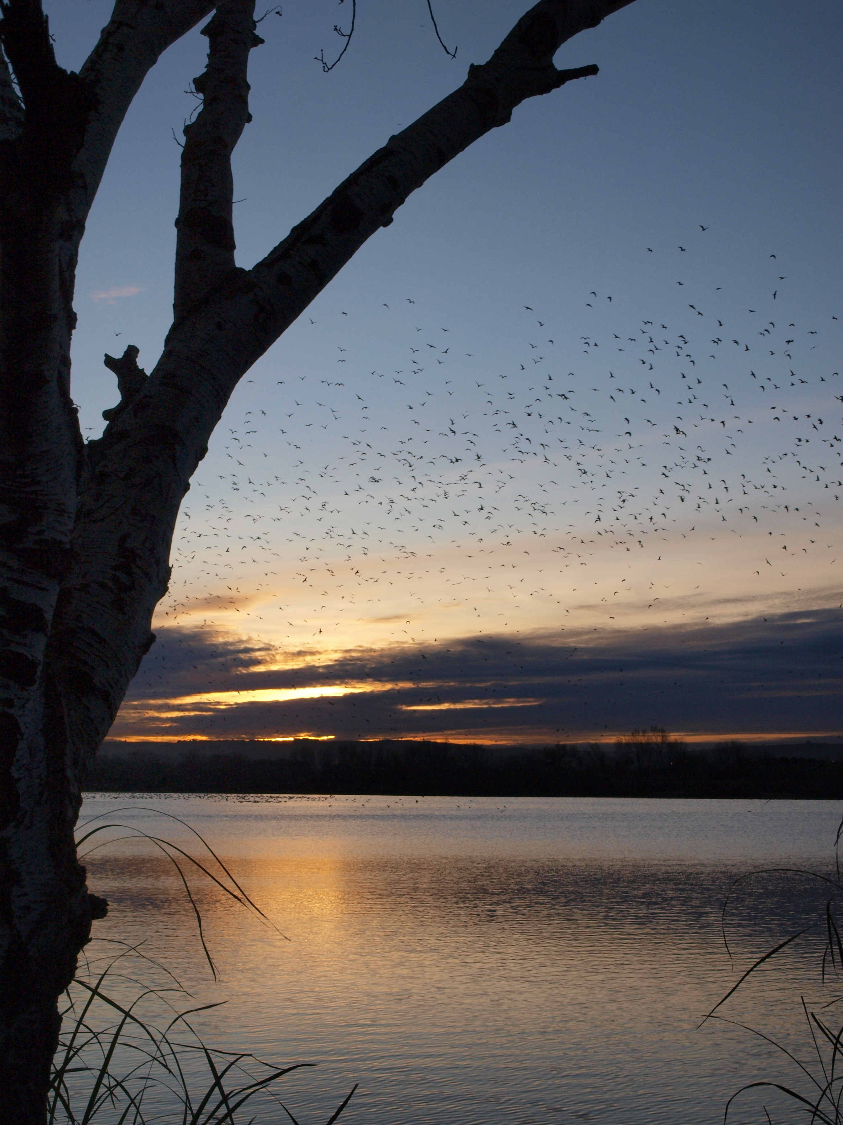 Amanecer desde la orilla de la Laguna del Campillo. This is a photography of a Special Area of Conservation in Spain with the ID: ES3110006. Natura2000 entry, EEA entry